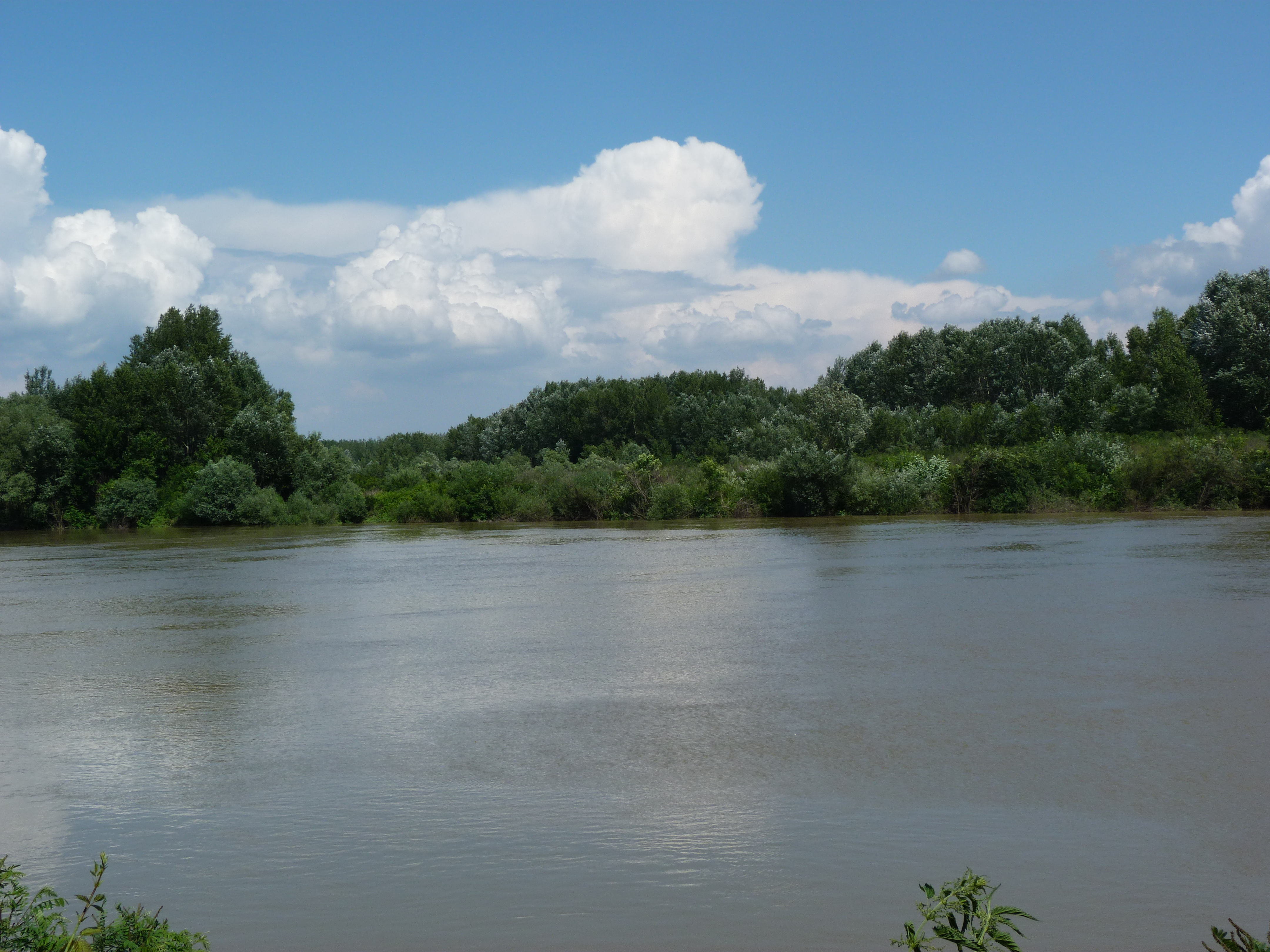 Live on the 14th of June, 2012. Szolnok, Hungary. Tisza river. Published under Creative Commons in the Metapolisz DVD line. A felvétel 2012. június 14 –én csütörtökön készült Szolnokon. Megjelent Creative Comons alatt a Metapolisz DVD sorozatban.